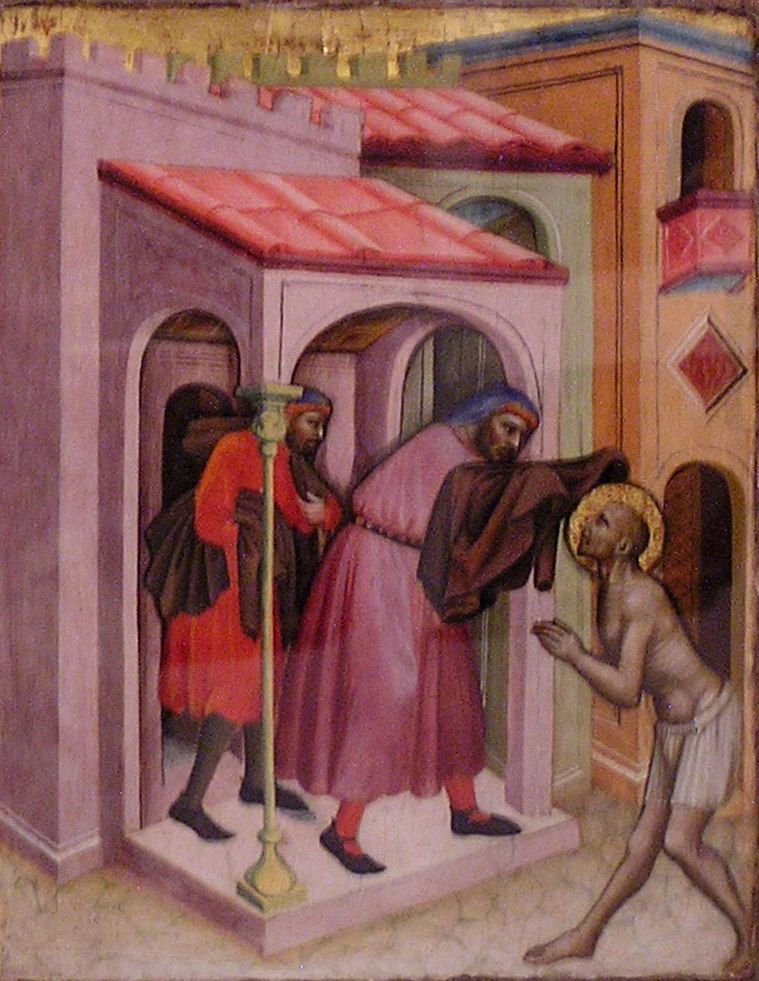 Sono io l'autore della foto. Rappresenta una tempera su tavola di Olivuccio di Ciccarello conservata nella Pinacoteca Vaticana. Fa parte della serie delle Opere di misericordia ed è intitolata: "Vestire gli ignudi". Era precedentemente attribuita a Carlo da Camerino. La foto non è purtroppo di buona qualità. Se ne avete una migliore sostituitela (nella Pinacoteca Vaticana è consentito fotografare le opere esposte).--Gep (msg) 18:22, 18 feb 2012 (CET)